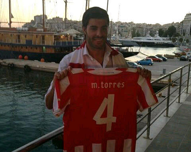 Presentación Miguel torres Olimpiakos